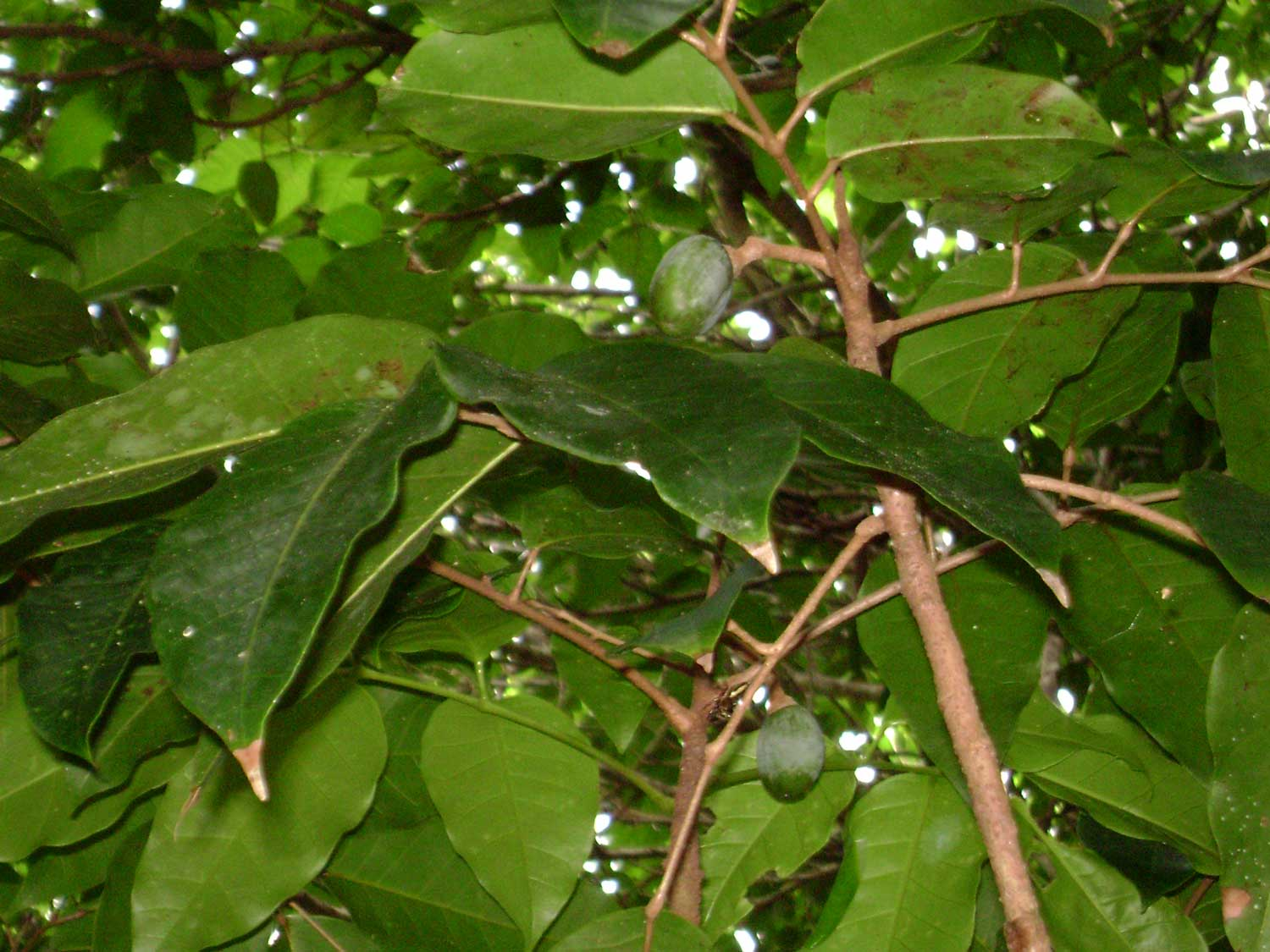 Canarium harveyi; (ʻai), ʻEneʻio botanical garden, Vavaʻu